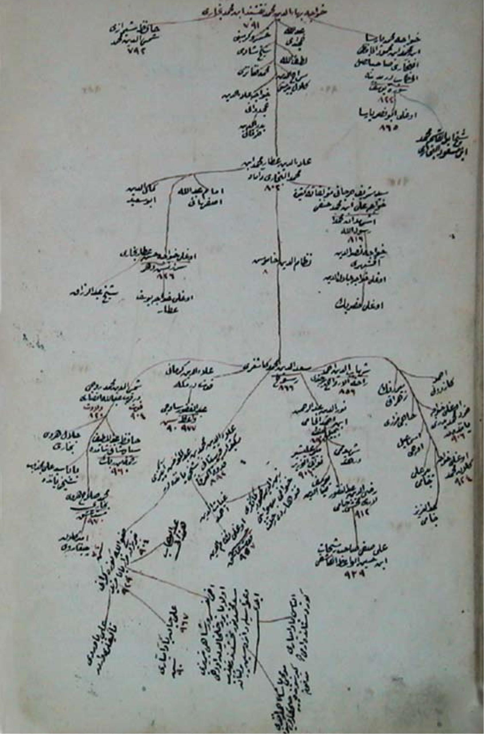 Nasreddin Hoca'nın Nakşibendilik yoluna mensup olduğunu gösteren Silsilenâme-i Aliyye-i Meşâyih-i Sûfiyye eserden silsilenâme.